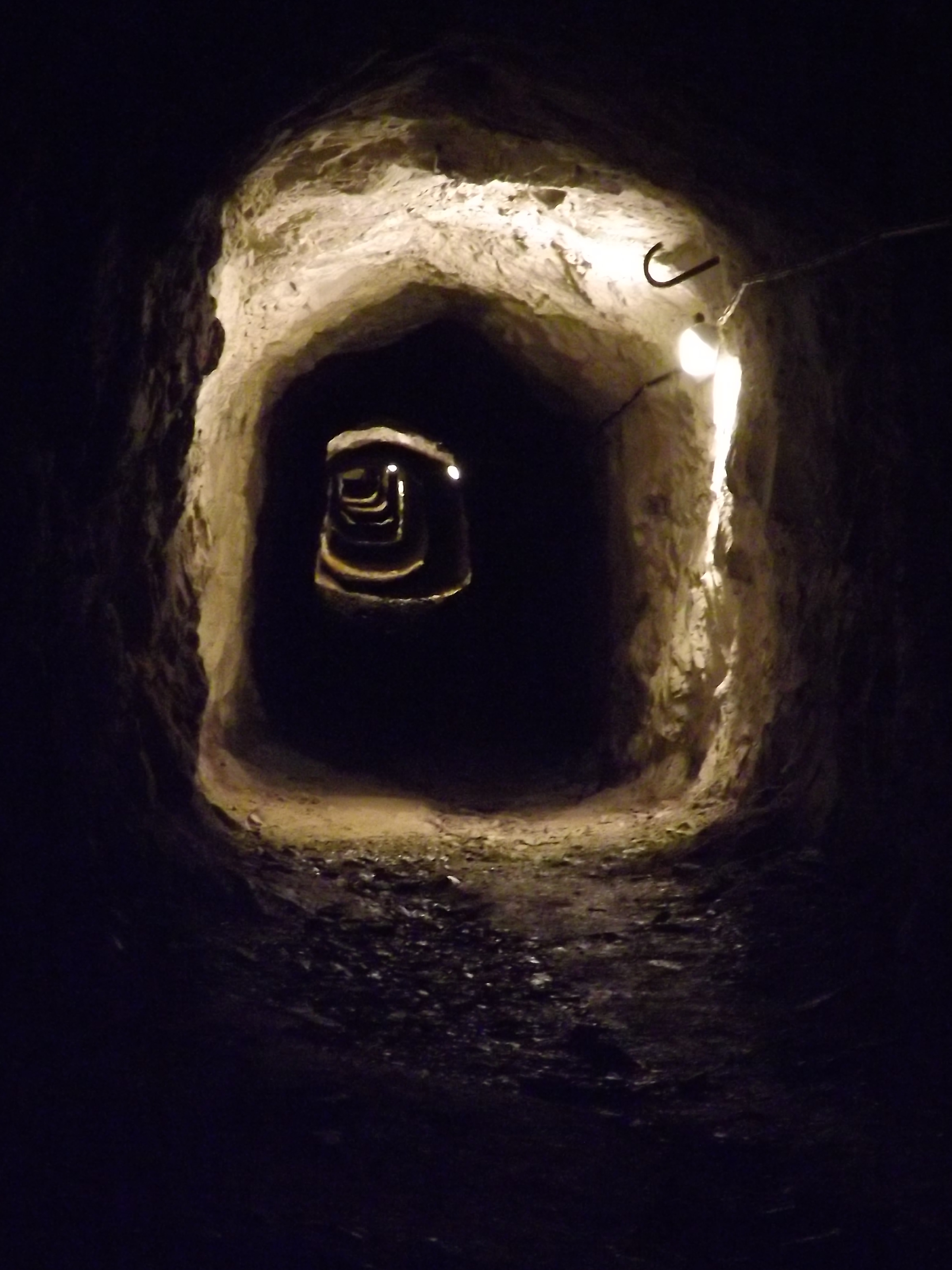 Una galleria della miniera Costa Jels a Gorno (BG)